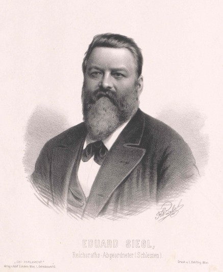 Eduard Siegl (1831 - 1889), Rakouský podnikatel a politik.